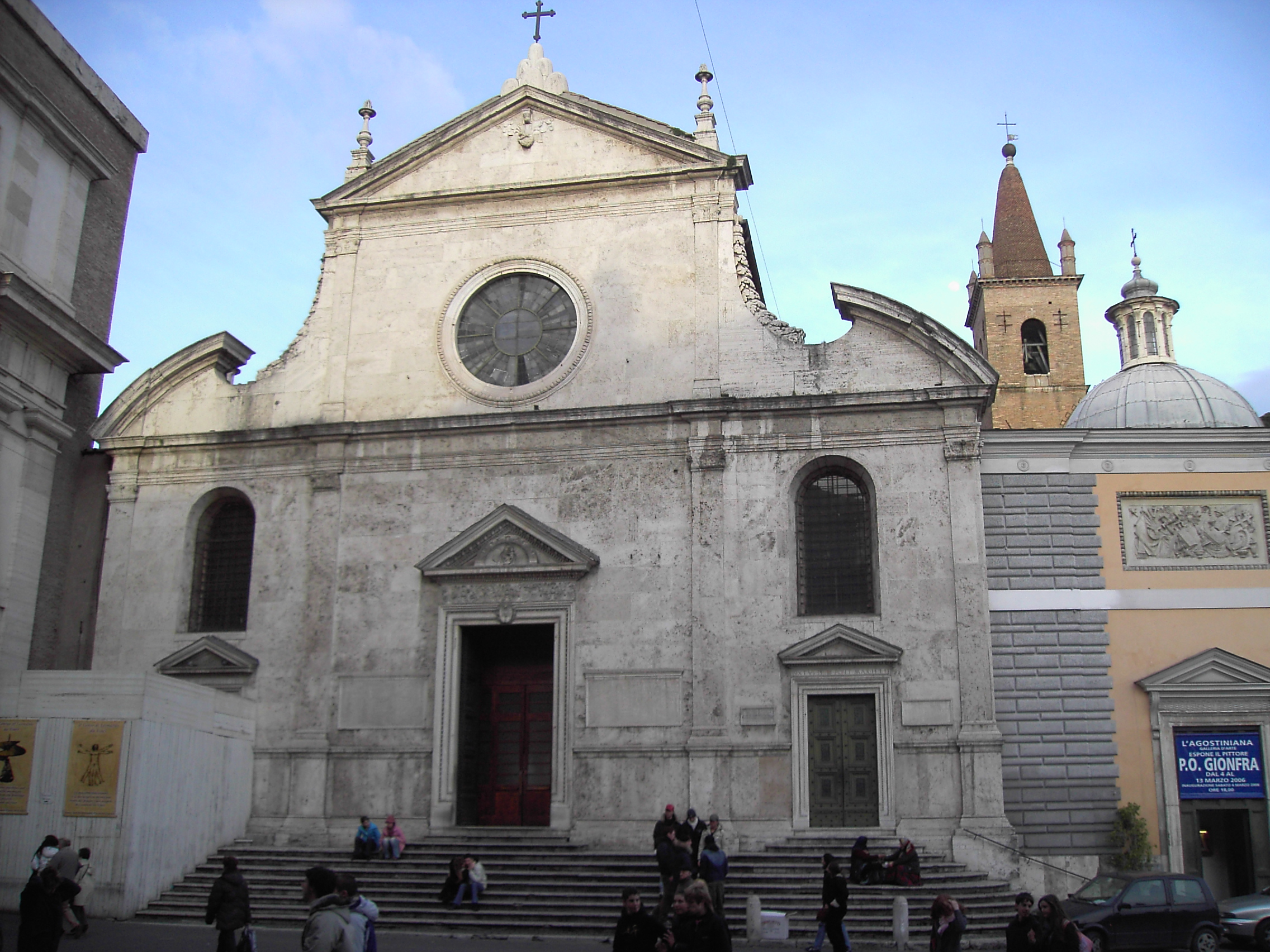 Roma, piazza del Popolo: Santa Maria del Popolo